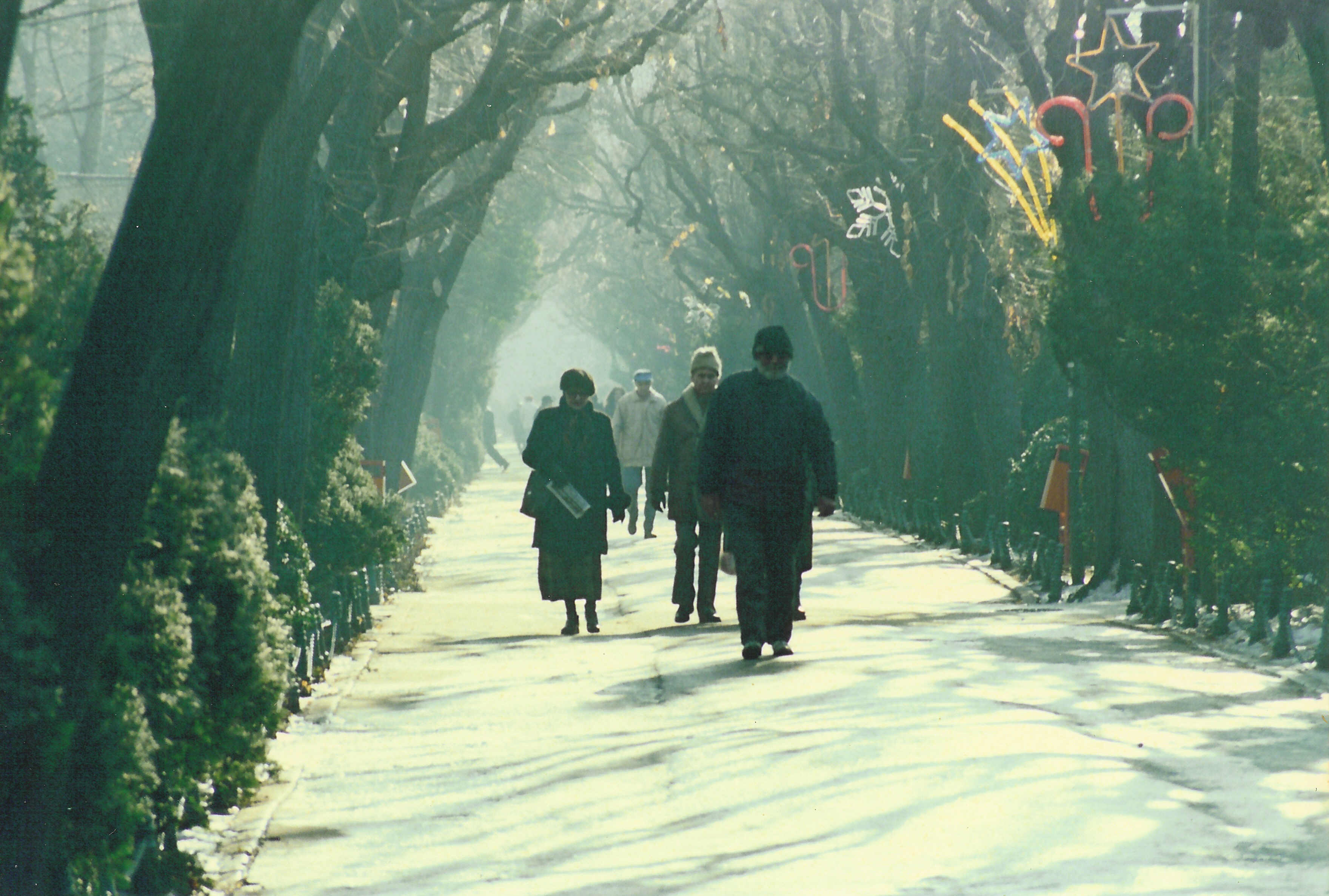 Grădina Cişmigiu (Cişmigiu Garden), Bucharest